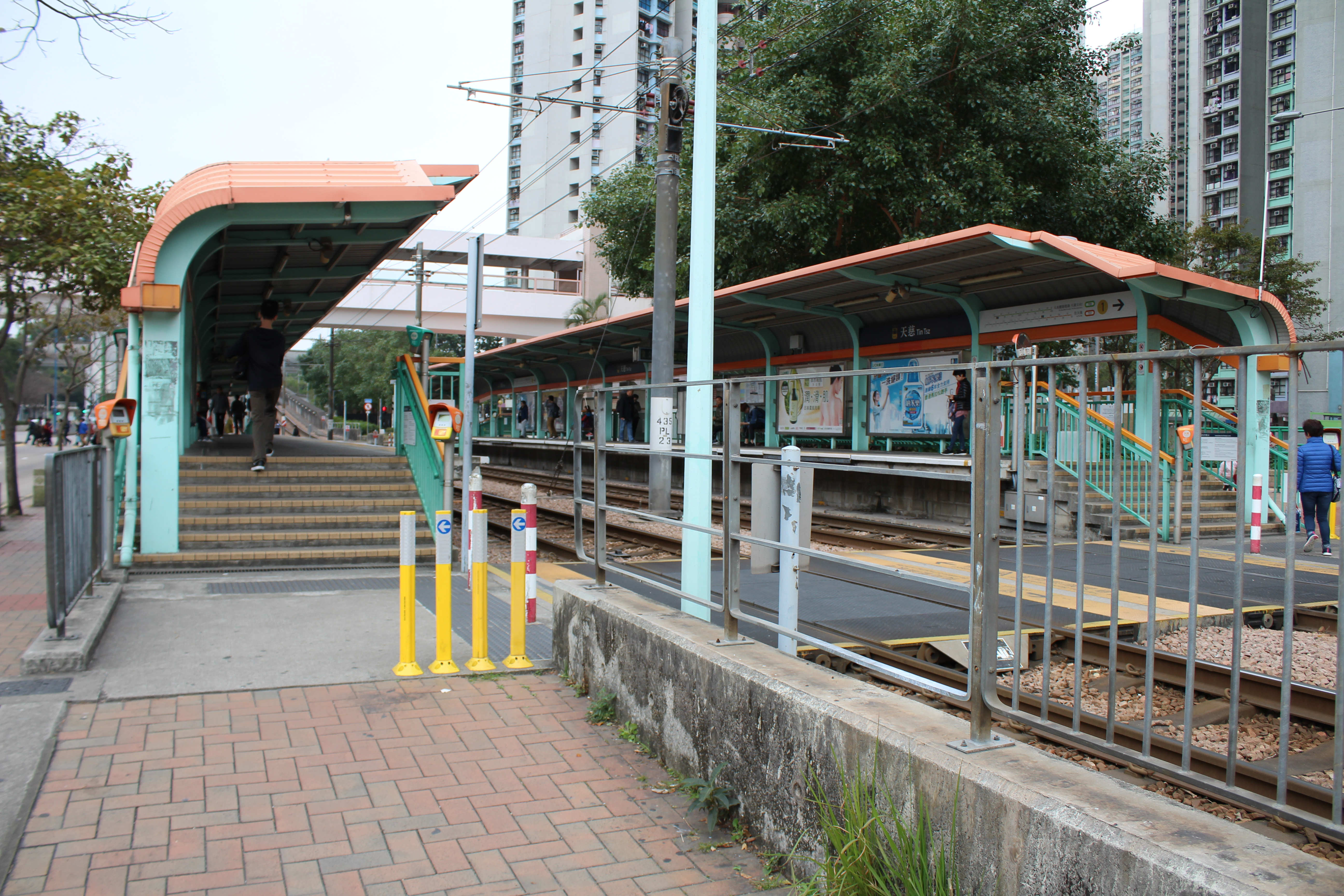 天慈站月台